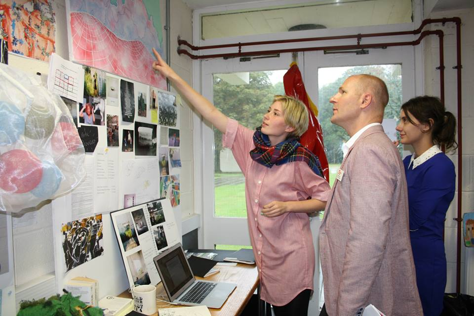 ISCA授業風景2